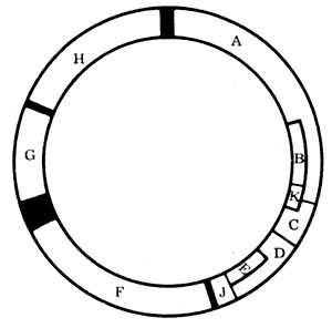 Φ174噬菌體重疊基因